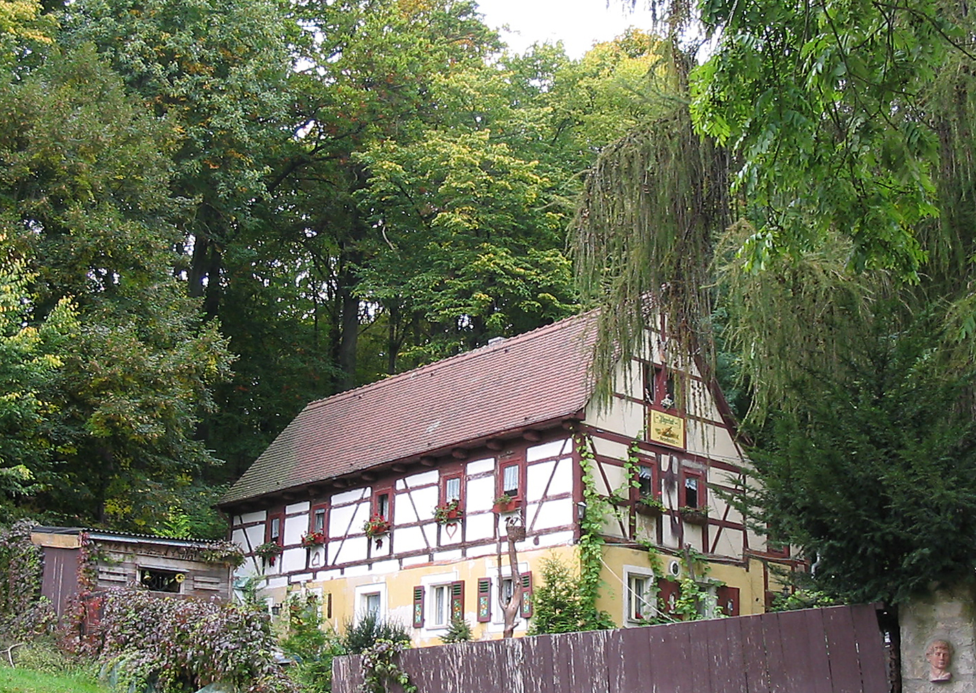 Radebeul, Bauernhaus Auf den Bergen 11, ehemals zur Goldschmidtvilla gehörend